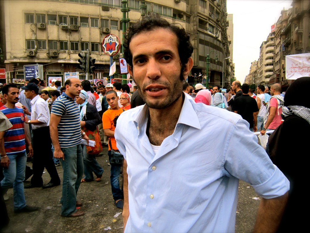 Haytham Mohamedain